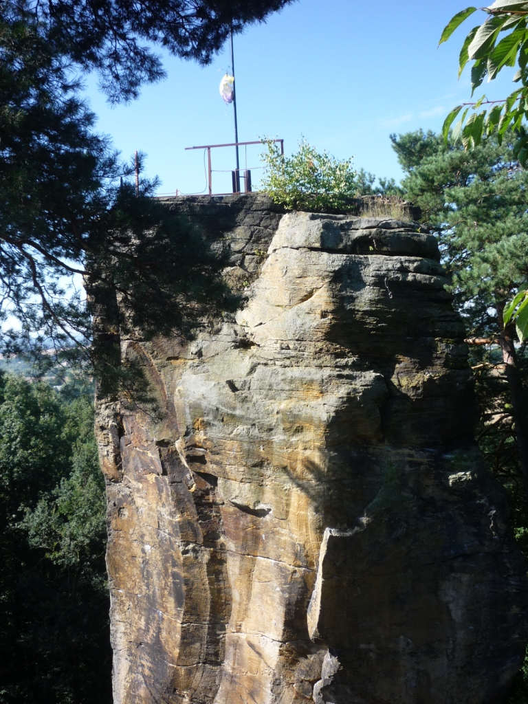 Pomnik przyrody - Skała z medalionem